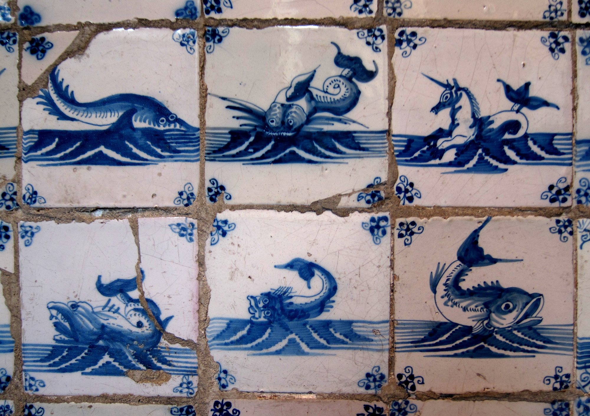 Carreaux de faïence lilloise à l'Hospice Comtesse de Lille (Nord).